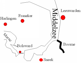 Schematisch kaartje van de Middelzee Zelf vervaardigd, met nl: draw.